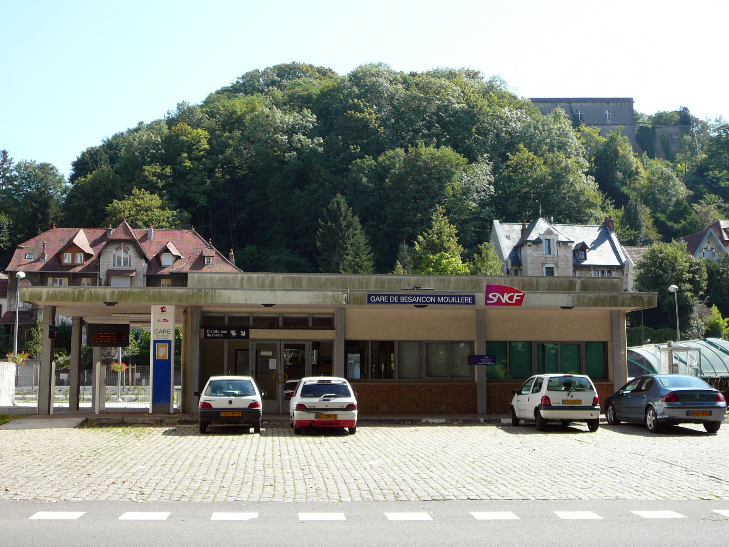 Gare de Besançon Mouillère côté cour